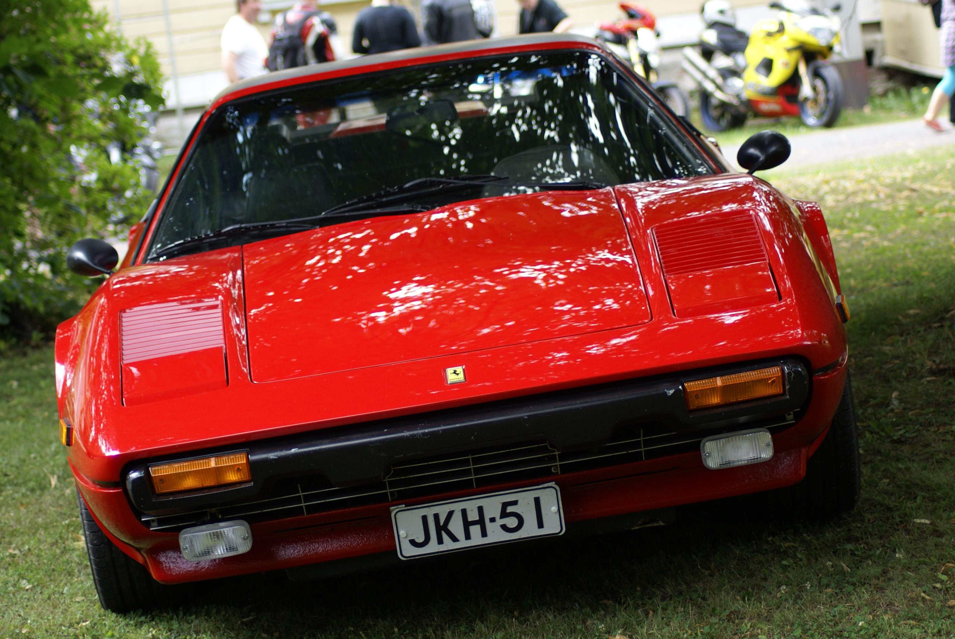 Ferrari 308 GTSi Forssassa "Bella Italia" näyttelyssä.